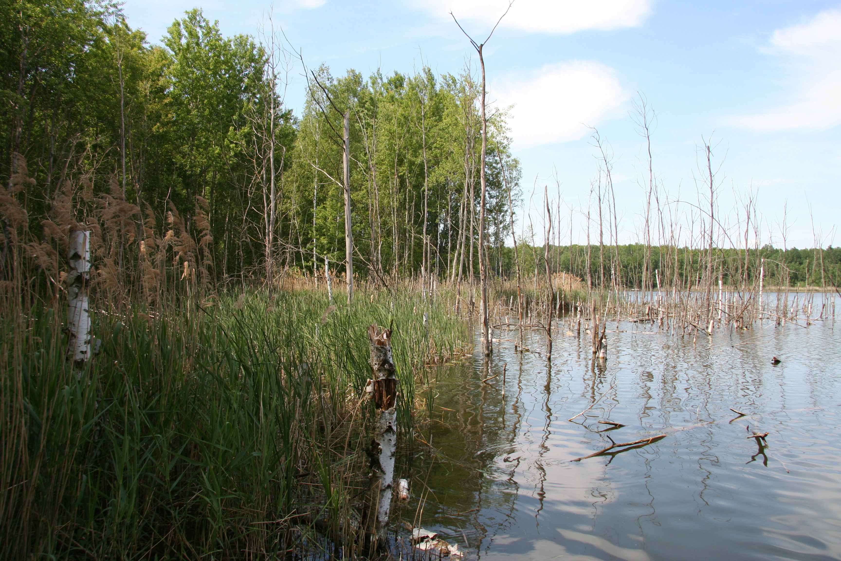 Im Naturschutzgebiet "Polenzwald", Landkreis Leipzig, WDPA-ID: 165019